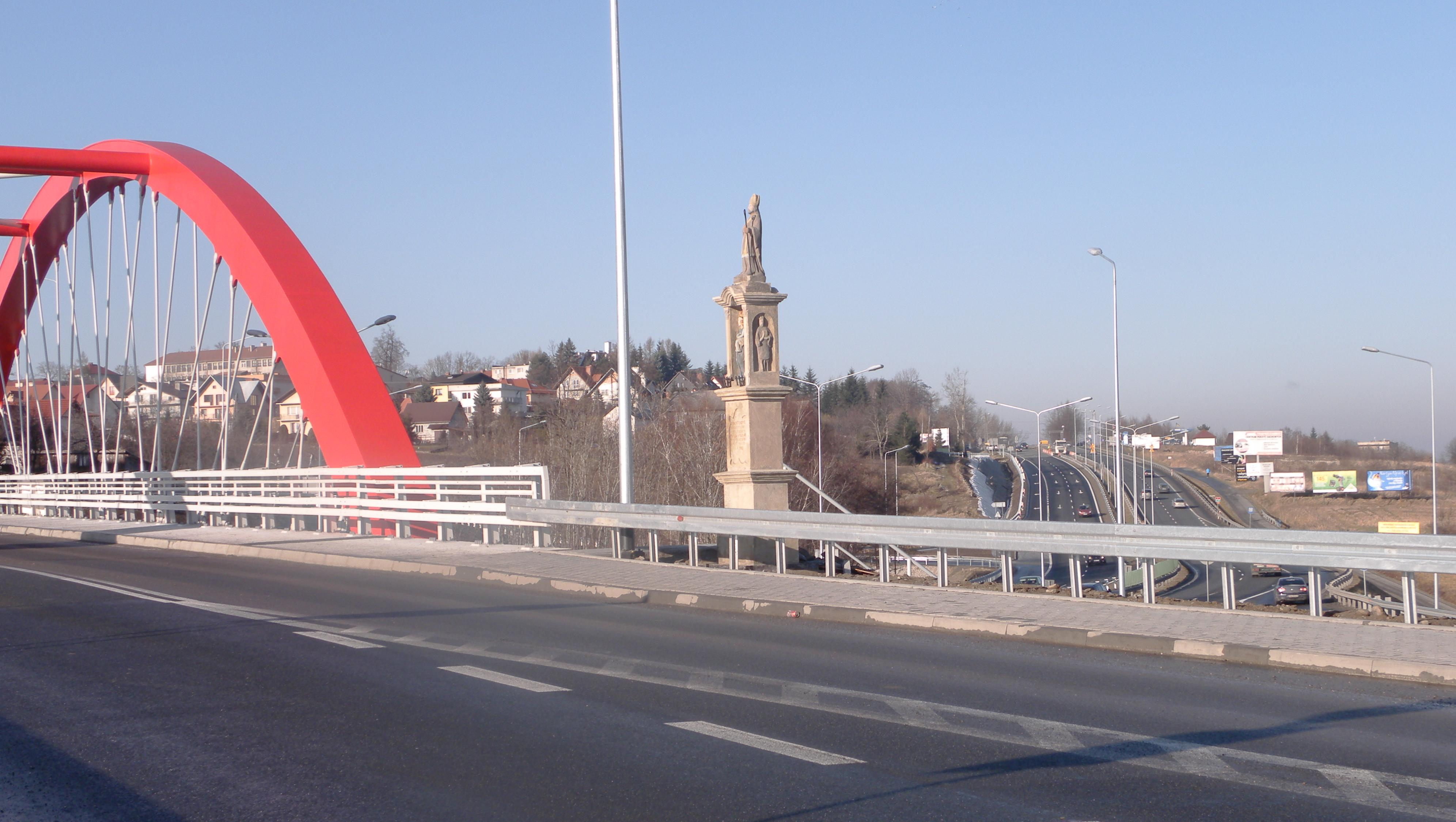 odnowiona kapliczka przy ul. Świątnickiej w Mogilanach, przy nowym wiadukcie nad "zakopianką"